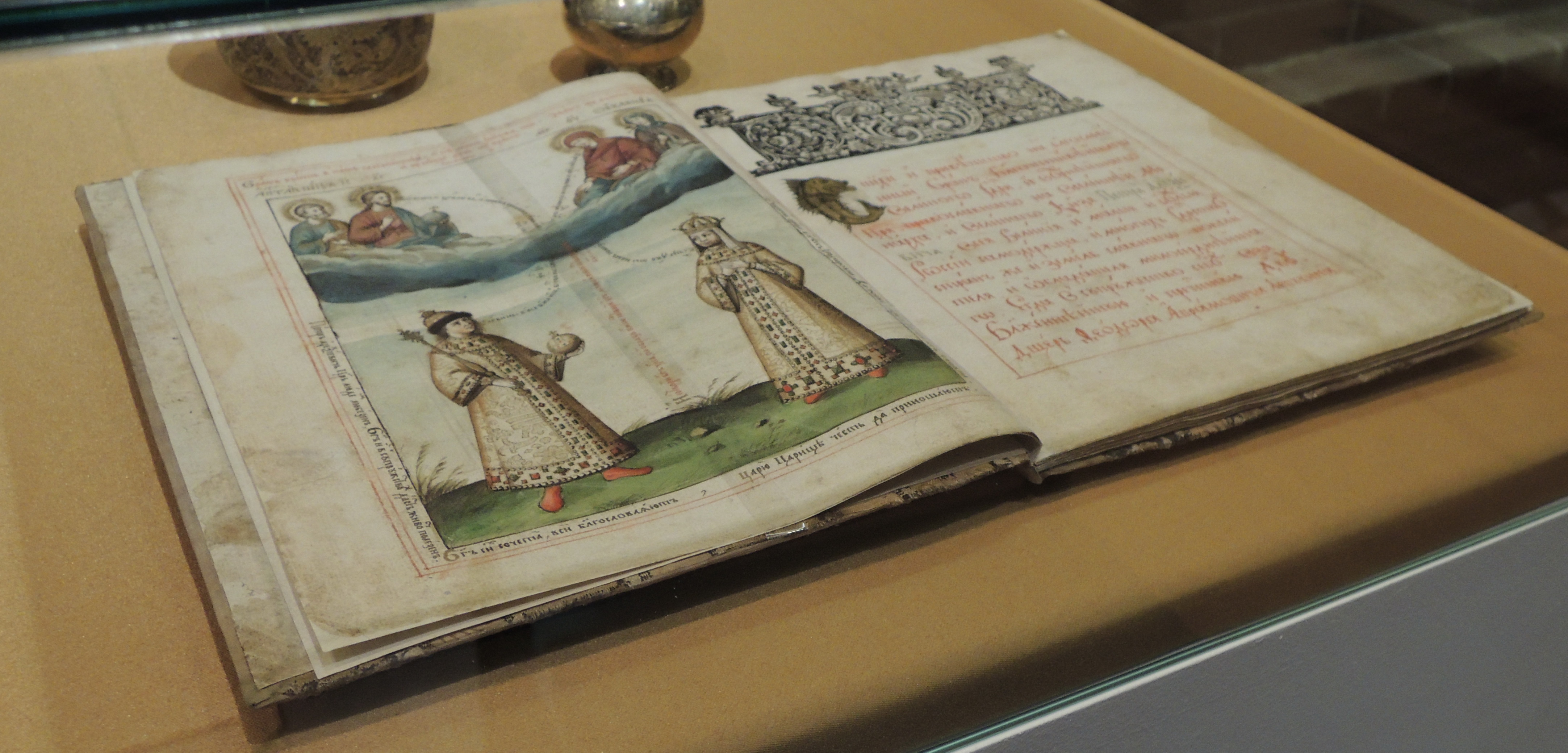 Picture from book about matrimonial love, marriage gift for 1st marriage of Peter I. рисунок, расположенный в начале «Книги любви знак в честен брак», преподнесенной в 1689 г. в качестве свадебного подарка Петру Первому. Автор: монах и придворный поэт Карион Истомин, принадлежащий, без сомнения, школе Симона Ушакова.